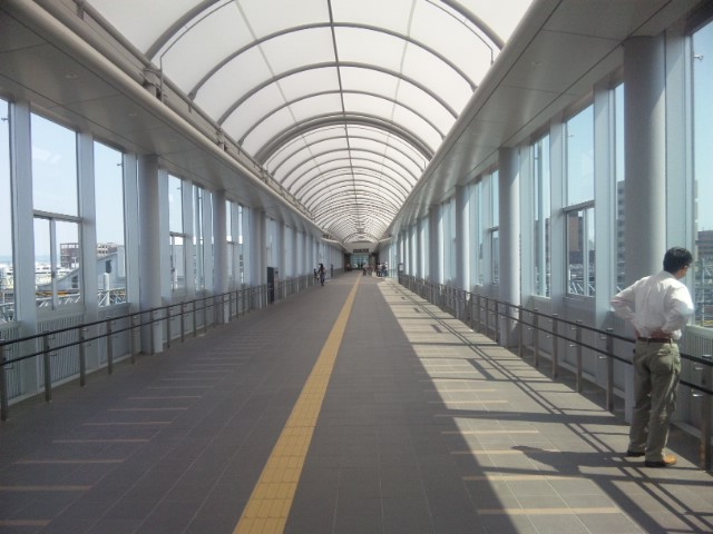 JR岸辺駅の上に出来た跨線橋の中の様子。投稿者本人による撮影。